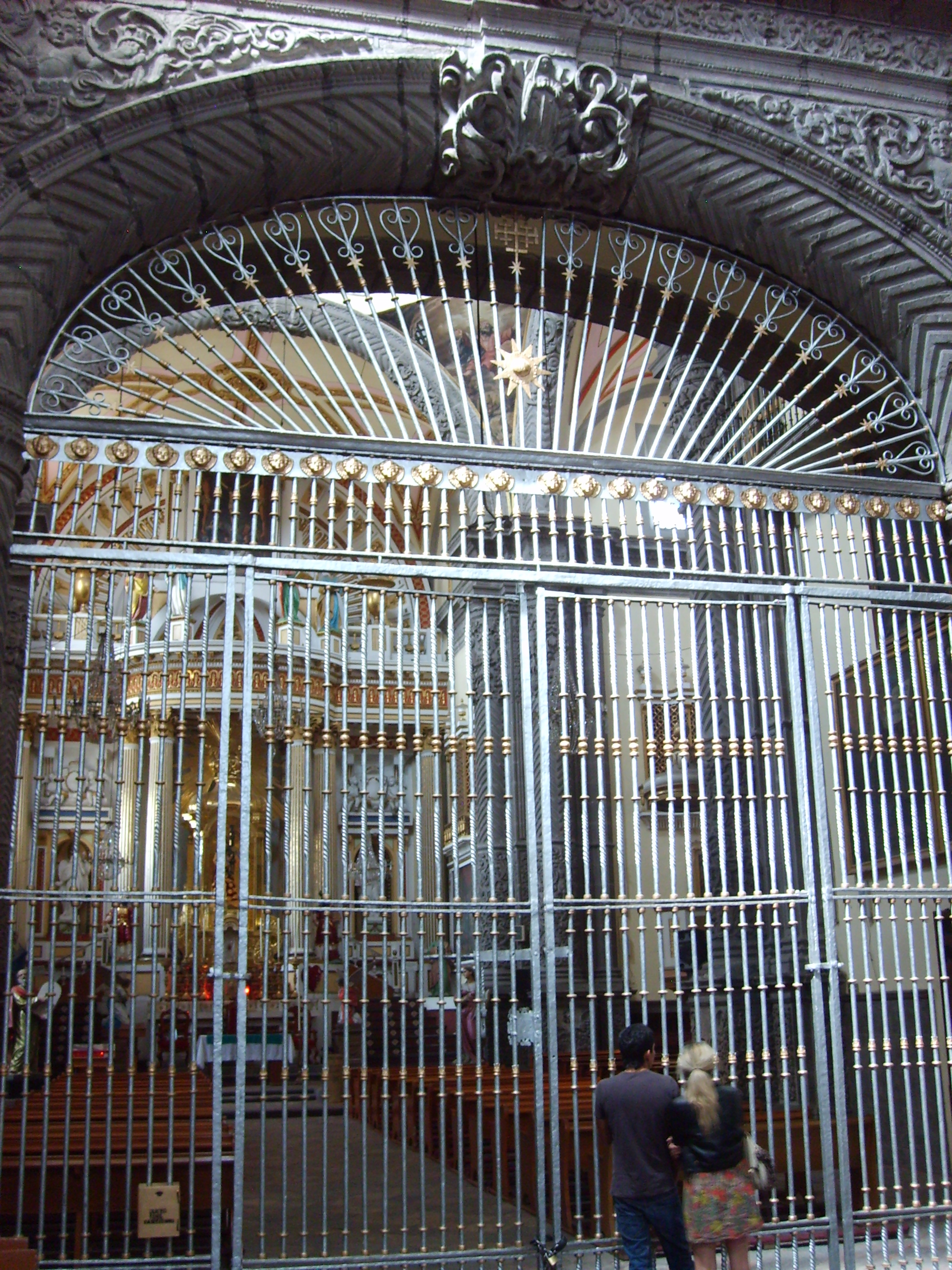 Capilla de Jesús Nazareno de la Parroquia de San José en el barrio poblano del mismo nombre.